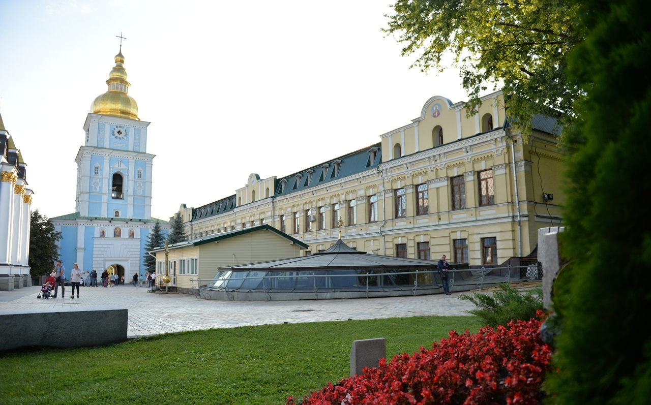 Навчальний корпус КПБА